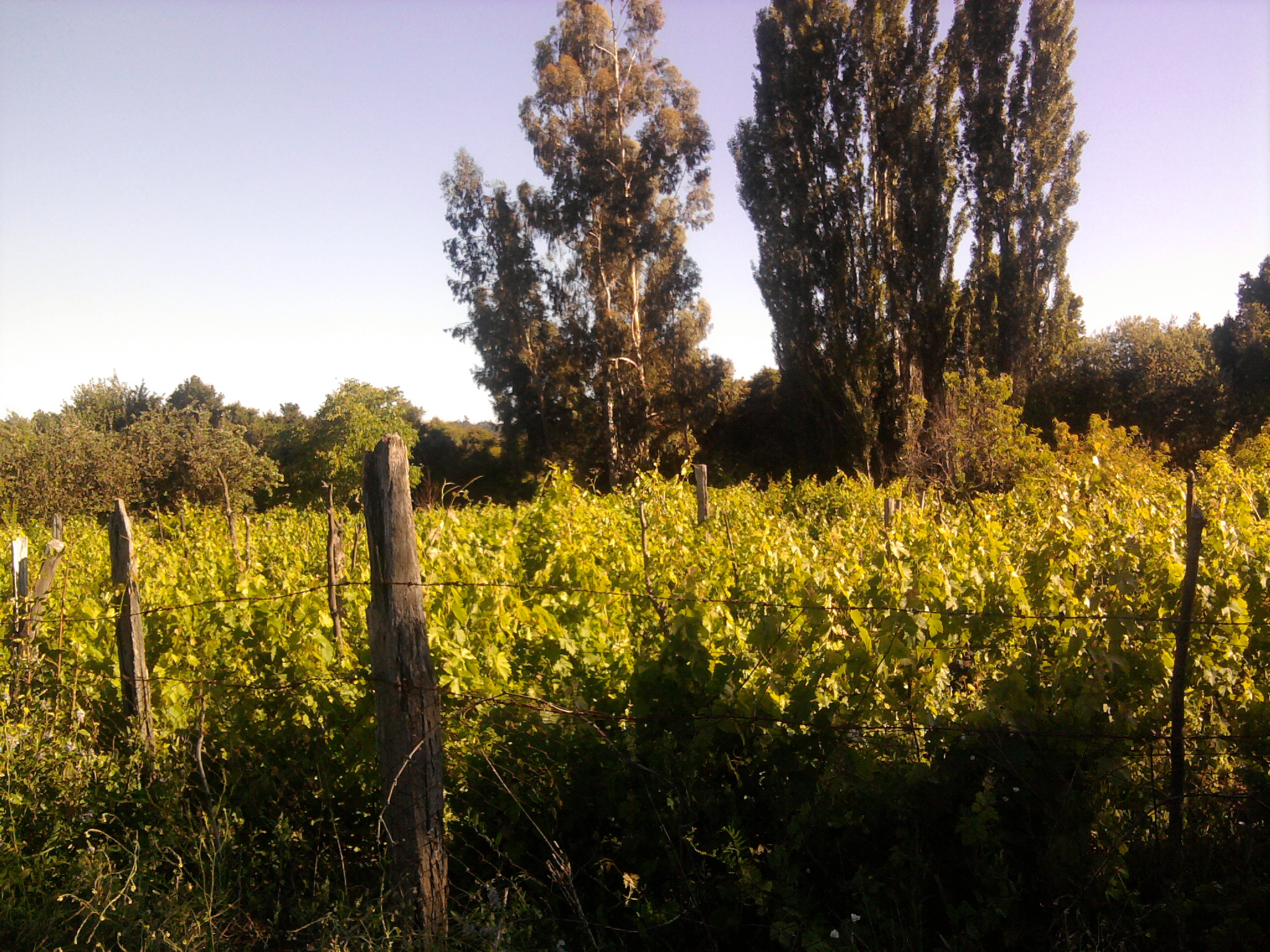 Viñedos colliguya